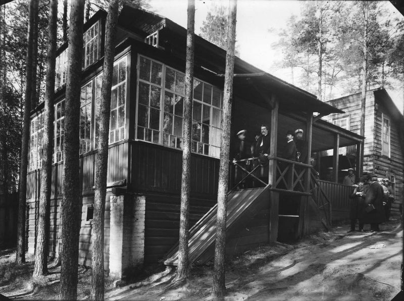 Дом в Озерках, где 28 марта был убит священник Гапон Дата съемки: 28 марта 1906 - 30 апреля 1906